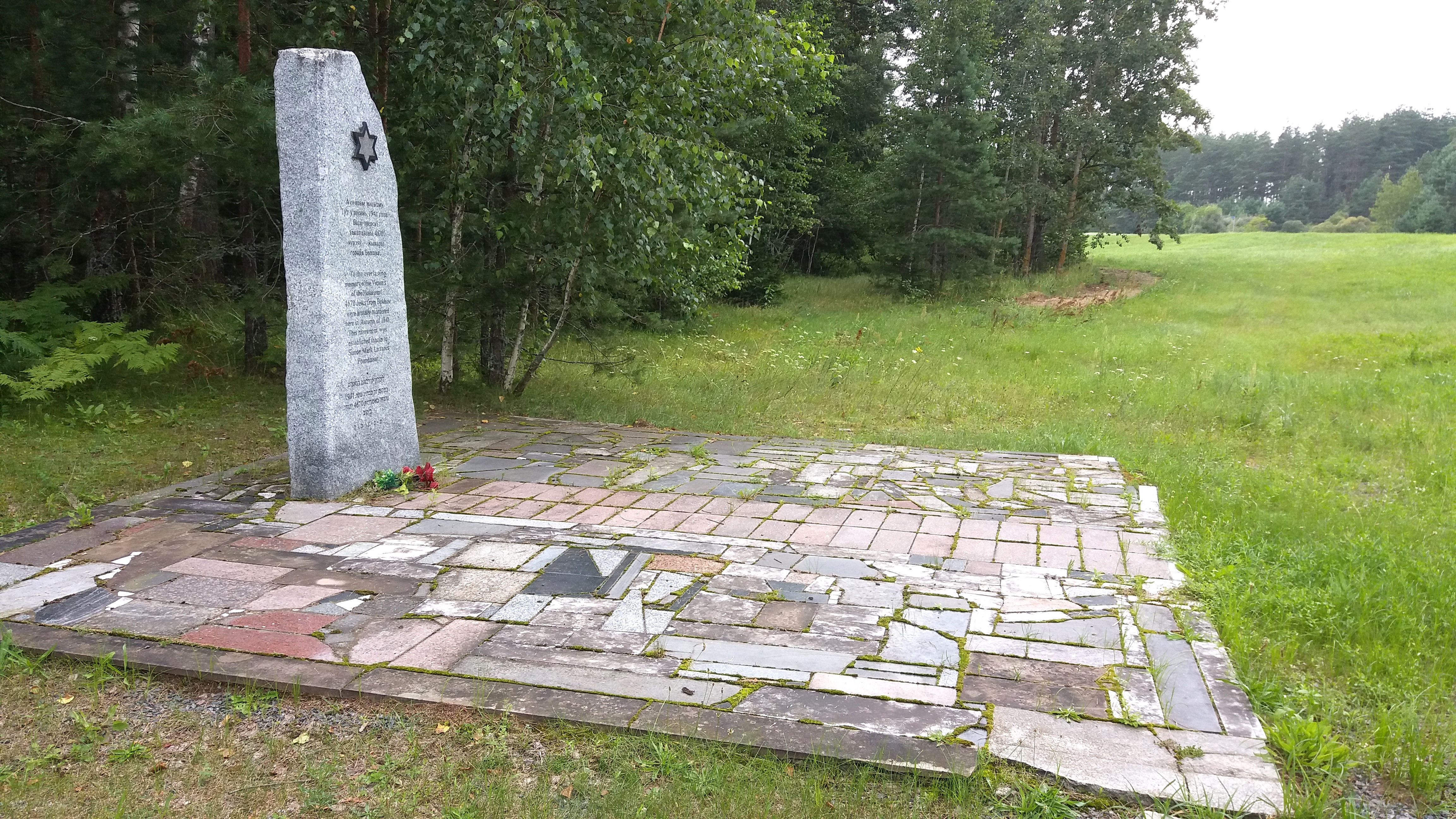 Памятник на месте убийства нацистами и захоронения осенью 1941 года 4670 евреев города Быхов Могилевской области Беларуси. Находится около деревни Воронино (Следюковский сельсовет Быховского района) в урочище Масловичи. Само место расстрела и могила находятся не на месте памятника, а в метрах 35-40 сзади за ним в бывших противотанковых рвах. После войны бо́льшая часть останков убитых была перезахоронена в две могилы (женщины и мужчины отдельно) на еврейское кладбище в Быхове.